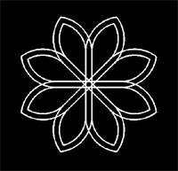 Drawn by mayooranathan